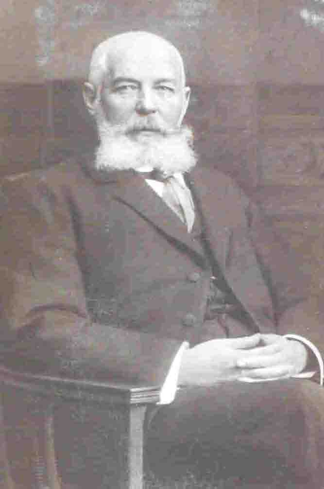 Walter Rogalla von Bieberstein (1851-1914), Member of Preussisches Herrenhaus